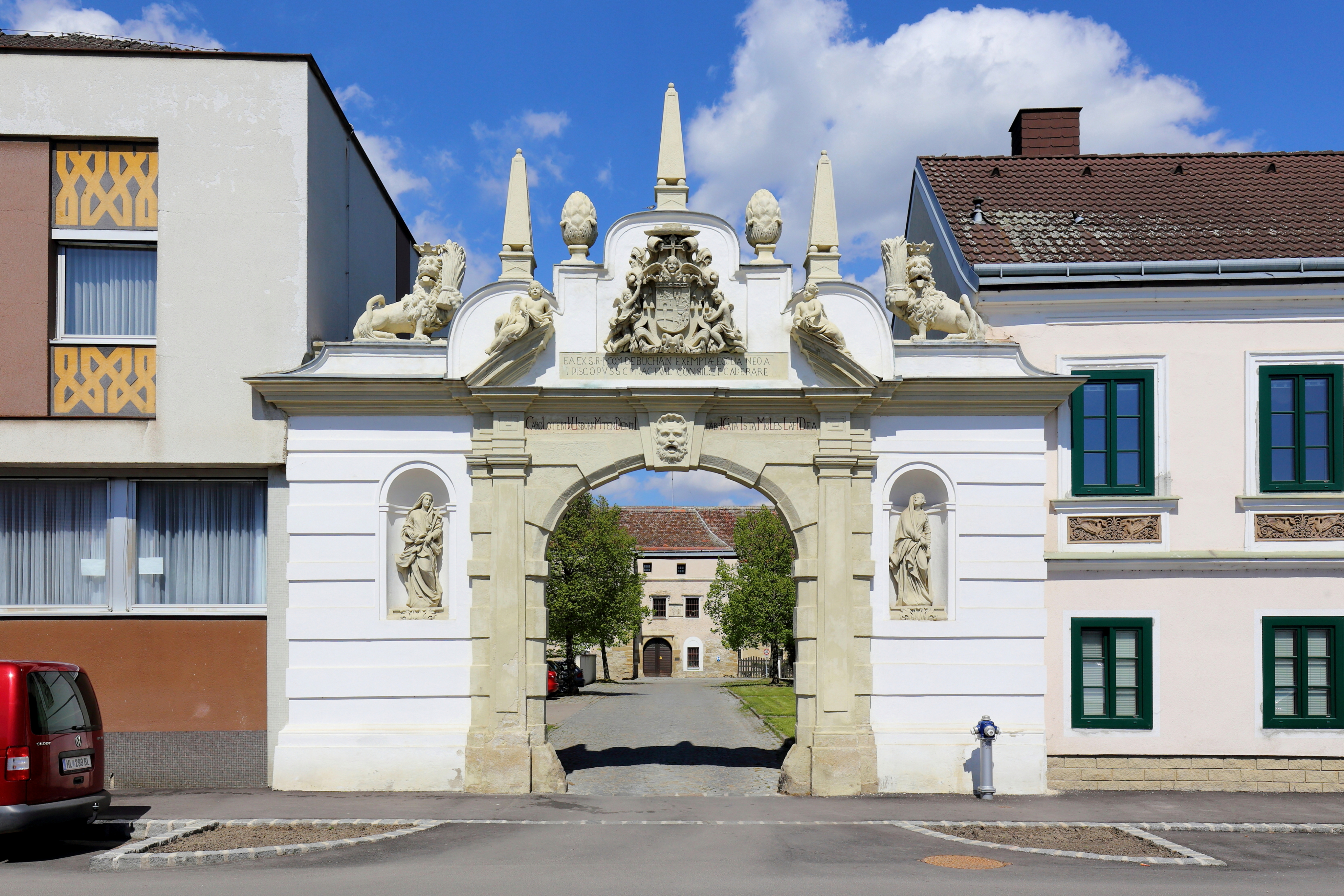 Schlosstor am Hauptplatz der niederösterreichischen Marktgemeinde Göllersdorf.Das Triumphtor hat seitliche Figurennischen mit den allegorischen Statuen Hoffnung und Glaube. Über dem Tor befindet sich eine Wappenkartusche, Obelisken, Zapfen sowie heraldische Löwen.Es wurde von Franz Anton Graf von Puchheim anlässlich der Durchreise von Karl III. (designierter Gegenkönig von Spanien) nach Lissabon zur Thronbesteigung errichtet.